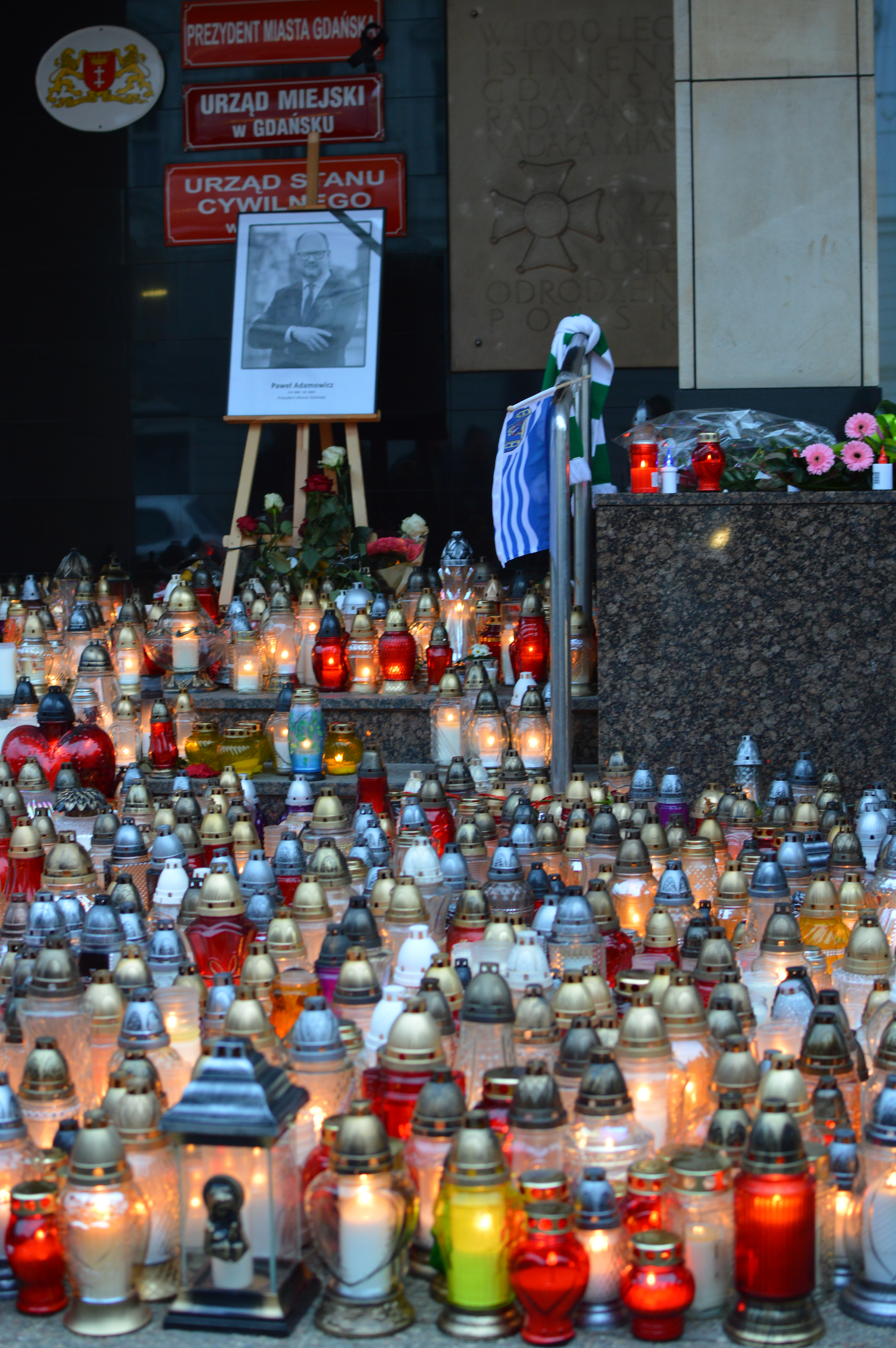 Urząd Miasta w Gdańsku, 15 stycznia 2019 - znicze od mieszkańców Gdańska